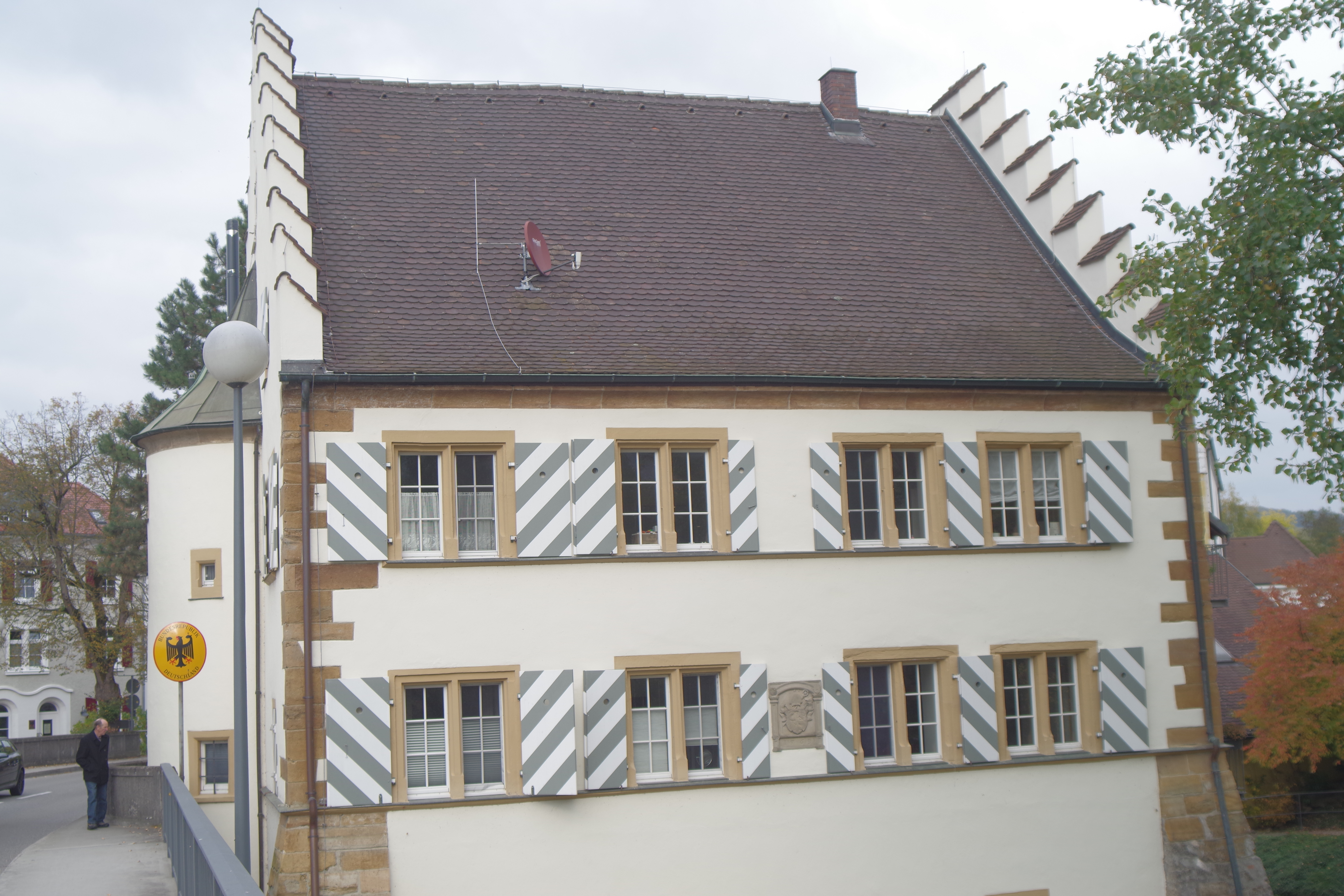 Rheinheimer Amtshaus in Küssaberg (Rheinheim)